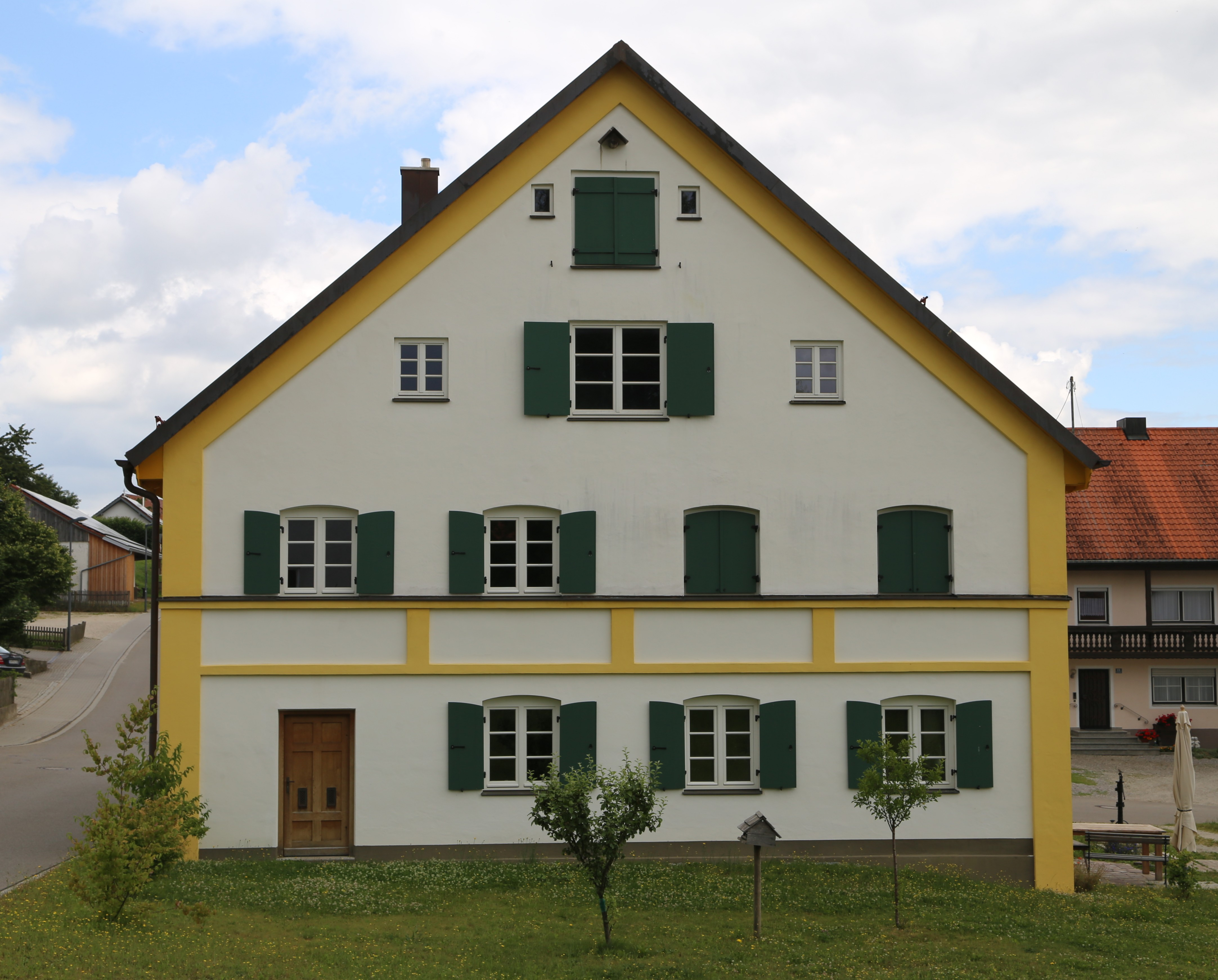 Bischof-Neuhäusler-Straße 50, Eisenhofen, Erdweg; Bauernhaus, zweigeschossiger Satteldachbau mit Lisenen- und Gesimsgliederung, im Kern 18. Jahrhundert, 1873 ausgebaut; Geburtshaus des Münchner Weihbischofs Johannes Neuhäusler